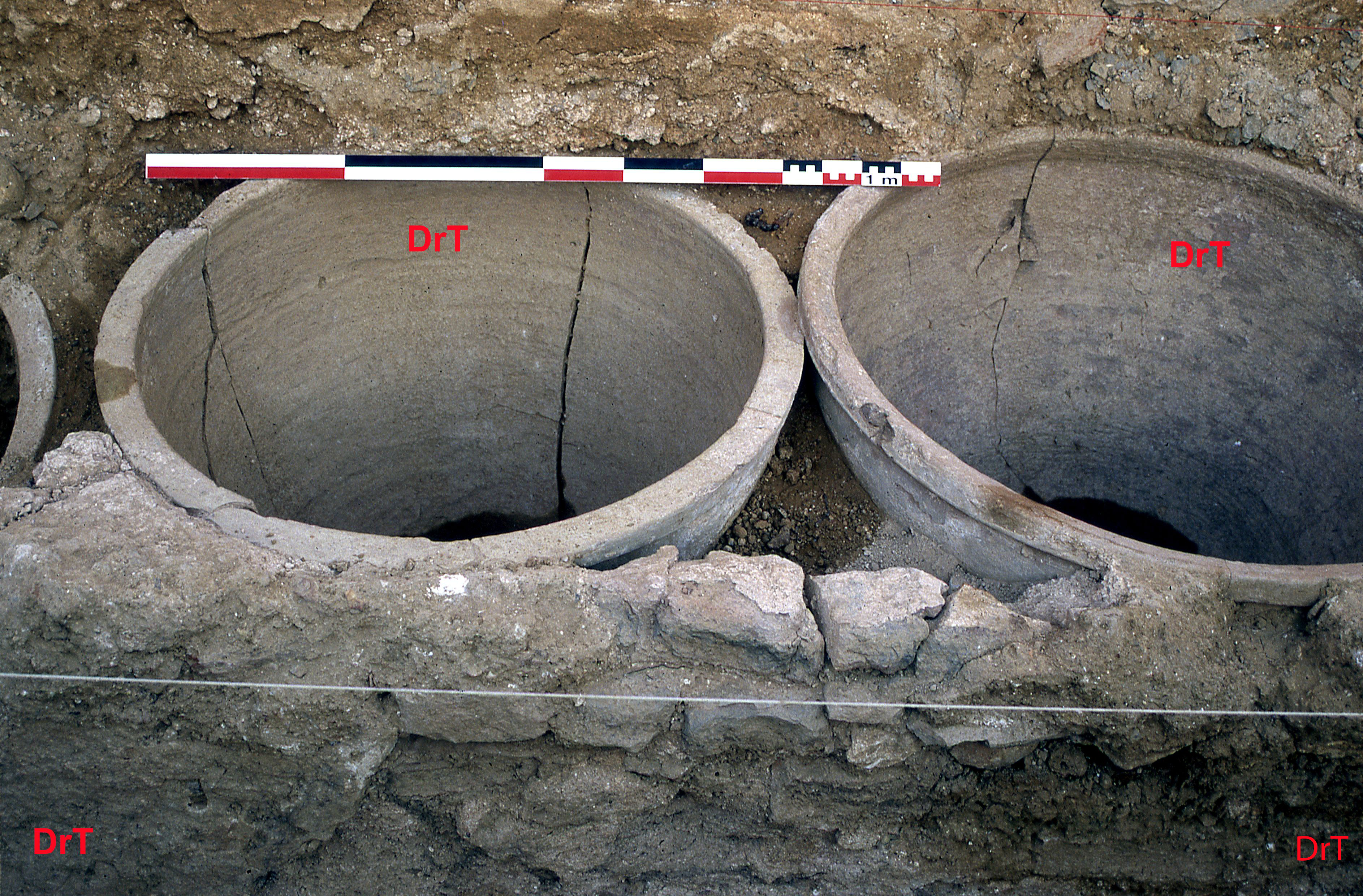 Dolien zum aufbewahren von Olivenöl aus der Ölmühle von Milreu, Estoi Portugal